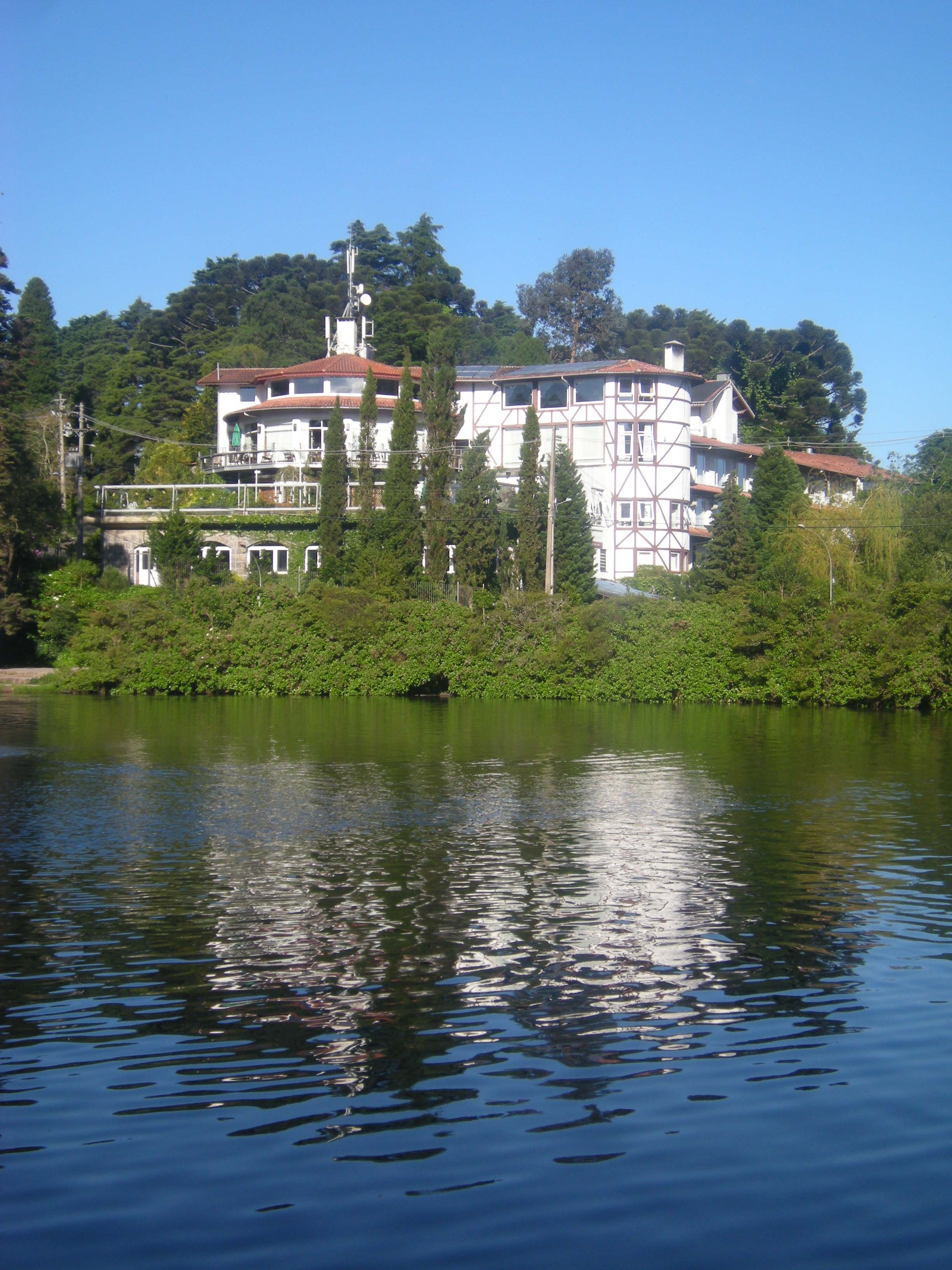 Hoteal a orillas lago